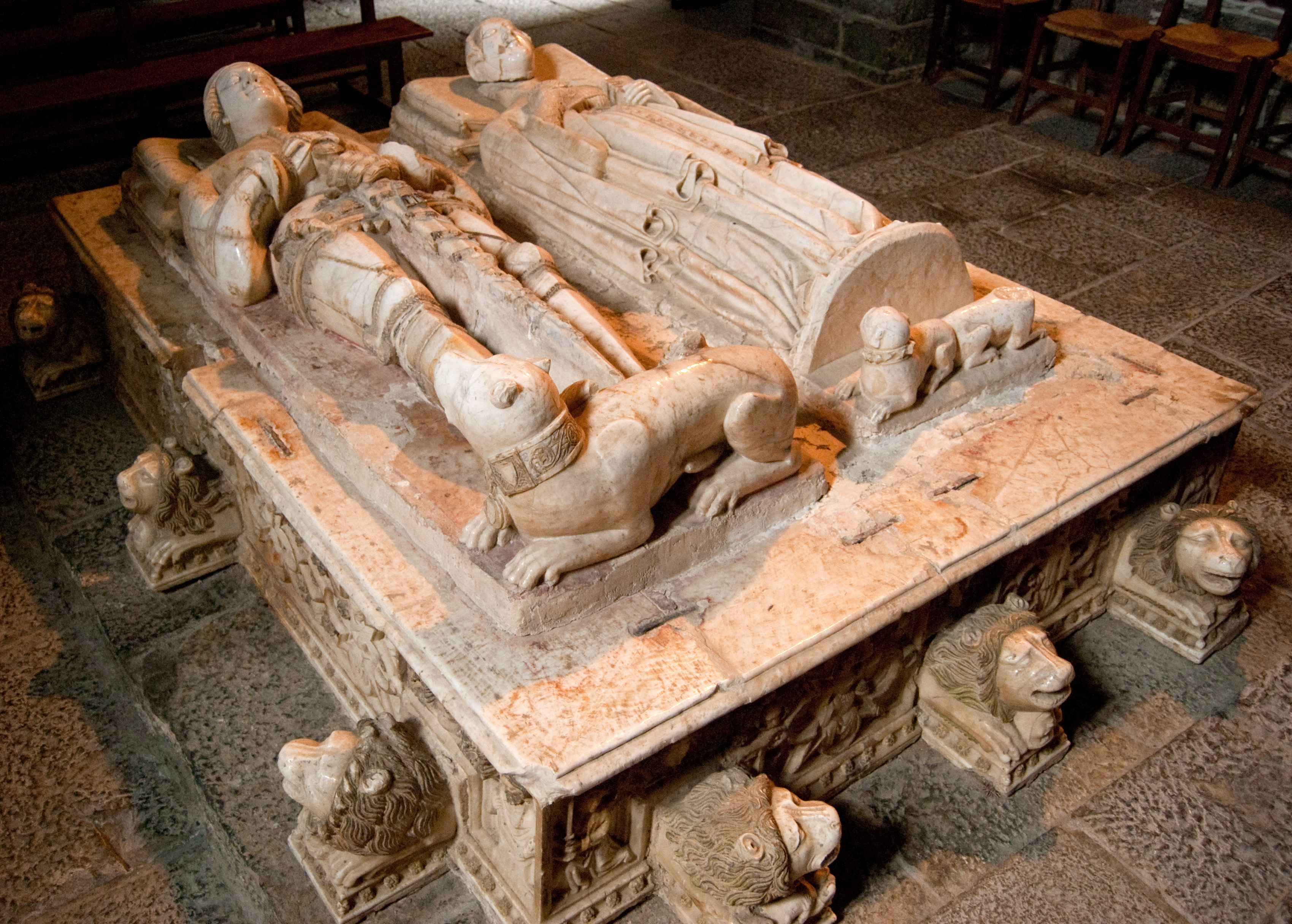 Sepulcro de alabastro de los Señores de Ayala, el Canciller Pedro Lope de Ayala y su esposa Leonor de Guzman.